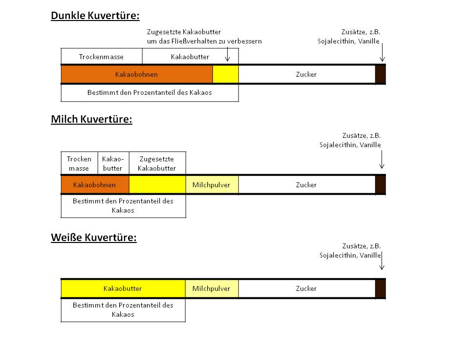 Schematische Darstellund der Zusammensetzung von Kuvertüre.